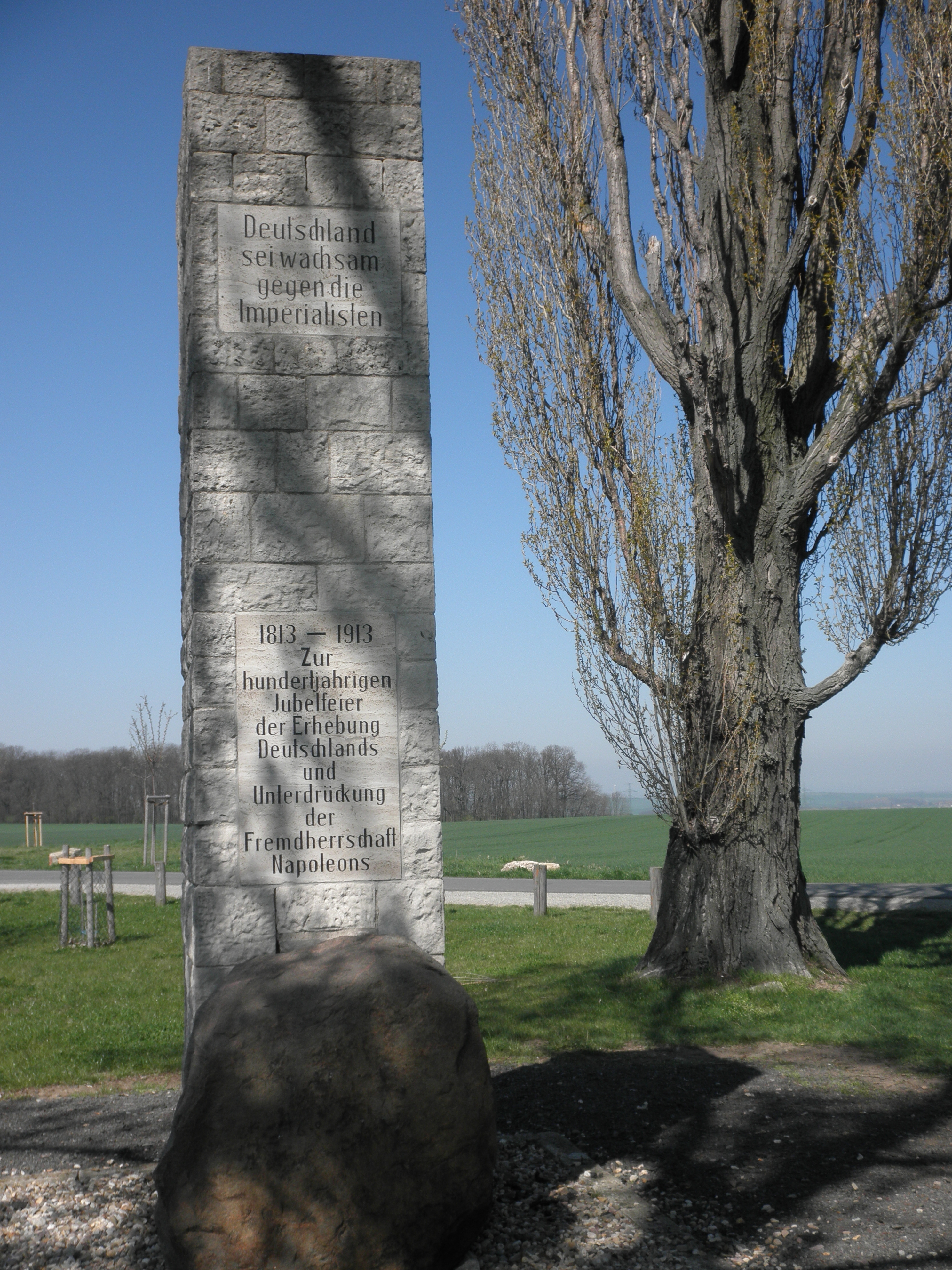 Napoleonstein (Nähe Weimar)